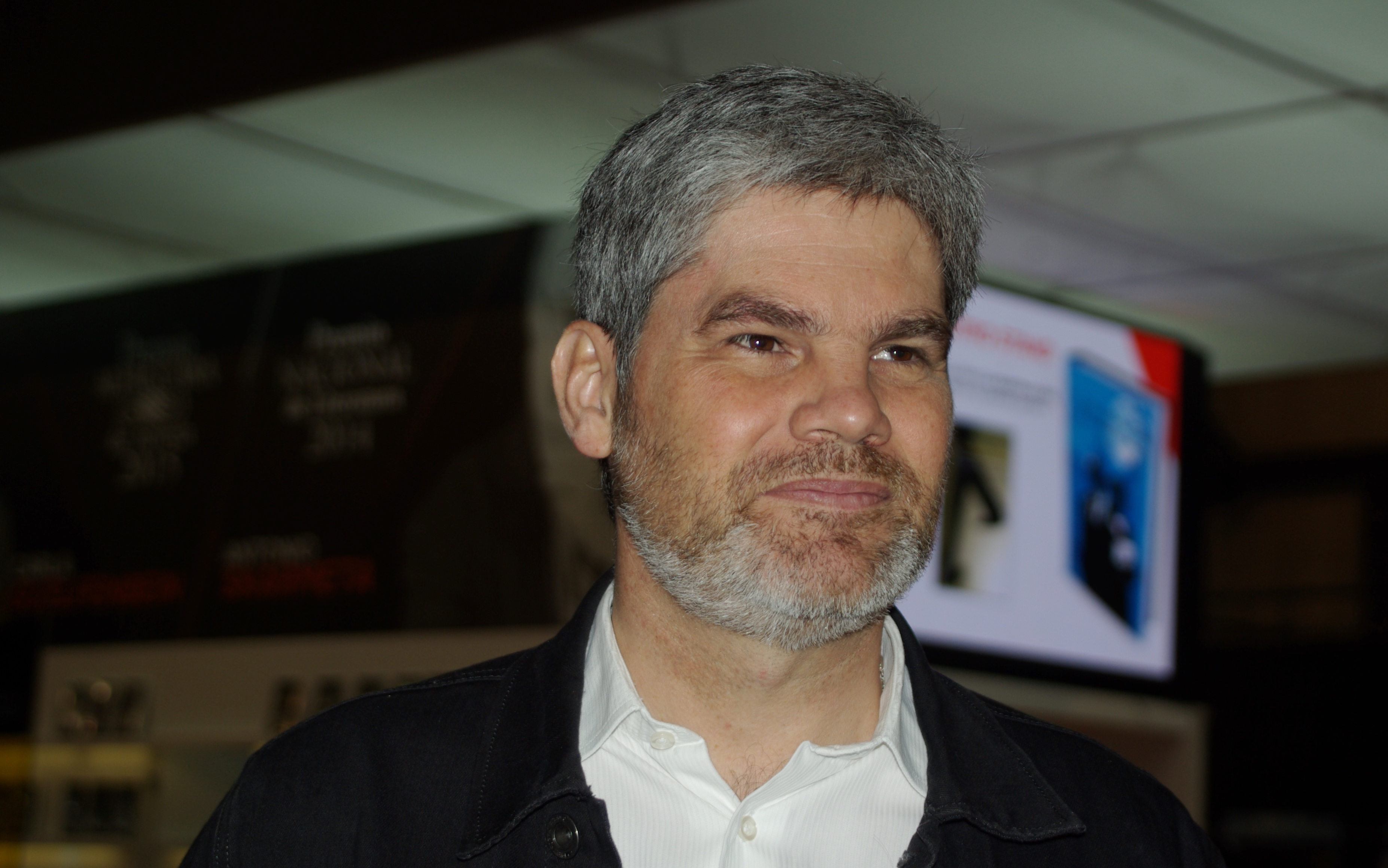 El periodista chileno Juan Cristóbal Guarello en la Feria Internacional del Libro de Santiago 2015